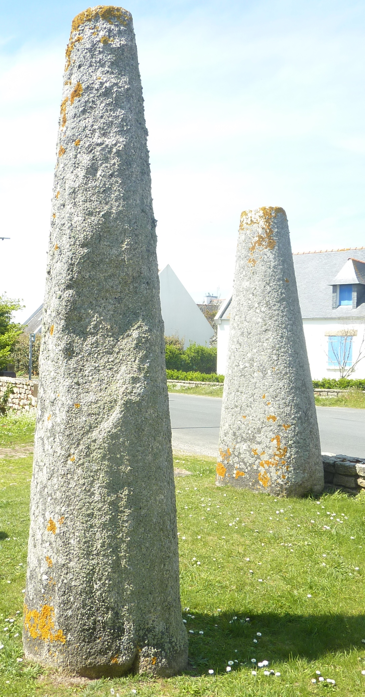 La stèle de Kerdeval (en Penmarch), réimplantée au Musée de la préhistoire finistérienne de Penmarch). Une autre stèle est visible à l'arrière-plan